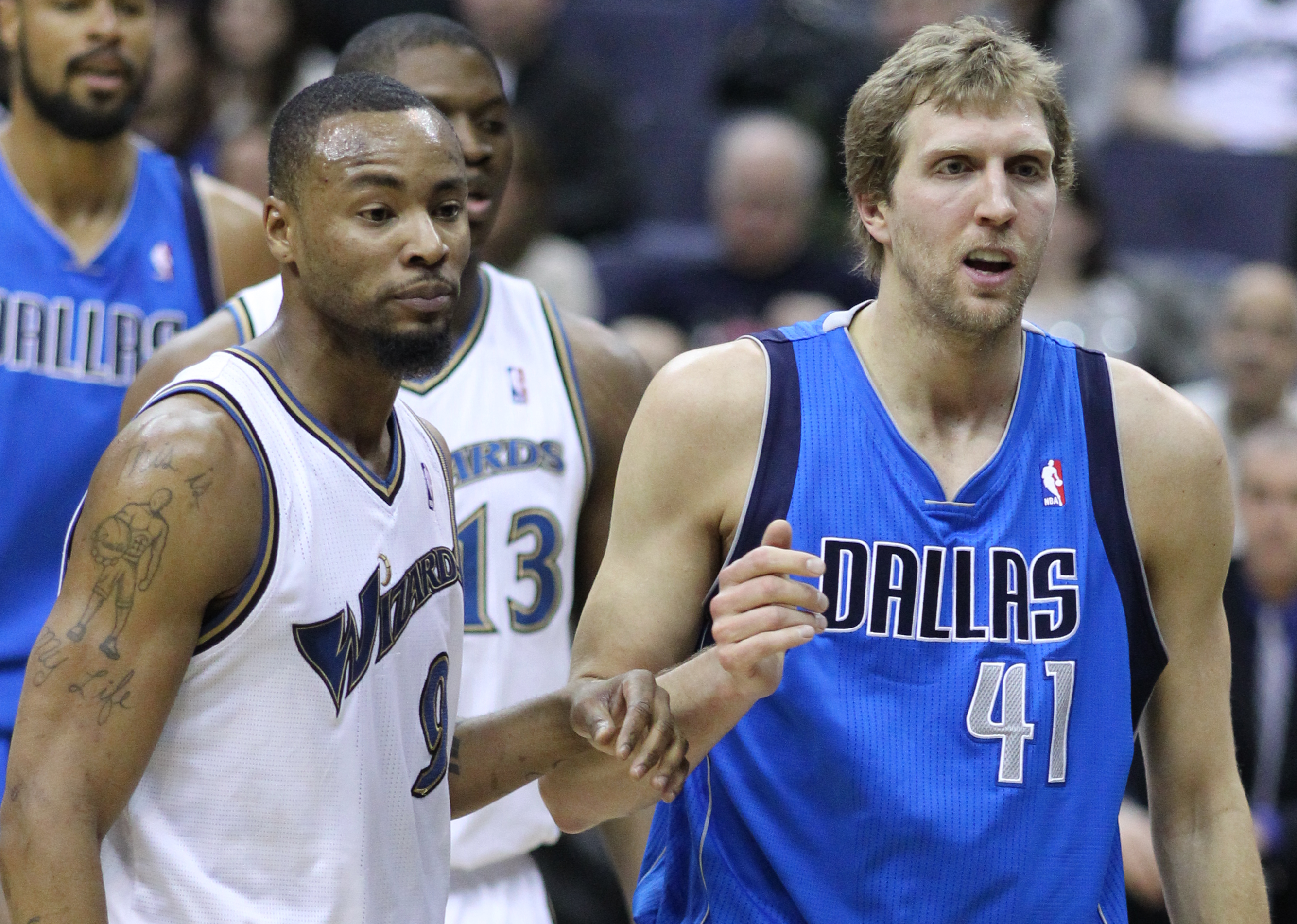 Wizards v/s Mavericks 02/26/11